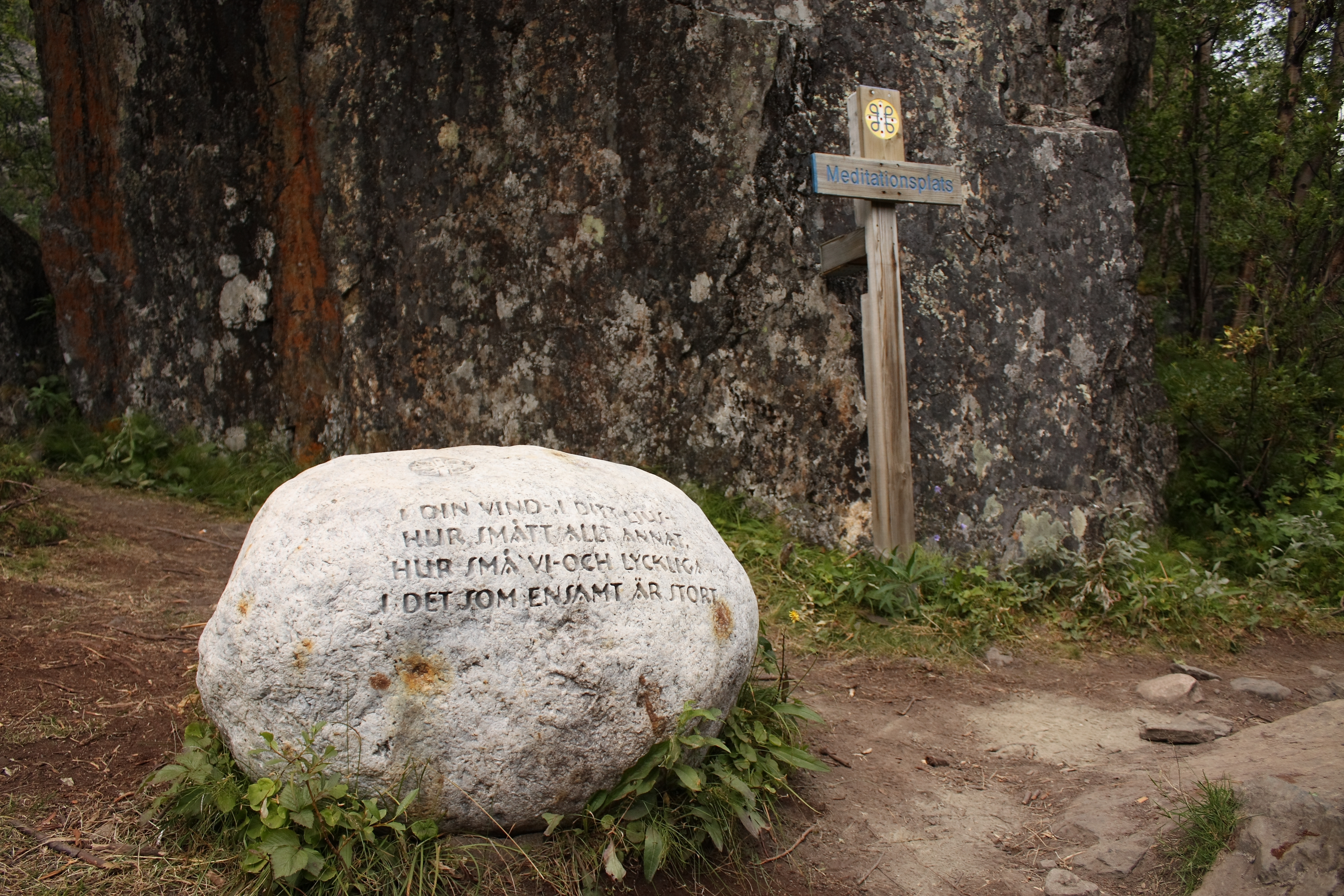 Den sjunde och sista meditationsplatsen, nedanför Darfaloalgi, efter Dag Hammarskjöldsleden.